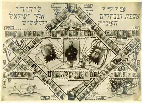 תמונת צירי אסיפת הנבחרים השנייה ליהודי א"י צירי האסיפה/ דב הוז (בפינה השמאלית התחתונה) ירושלים 28